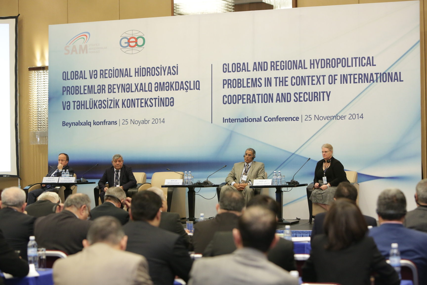 Qlobal və regional hidrosiyası problemlər Beynəlxalq Əməkdaşlıq və təhlükəsizlik Kontekstində